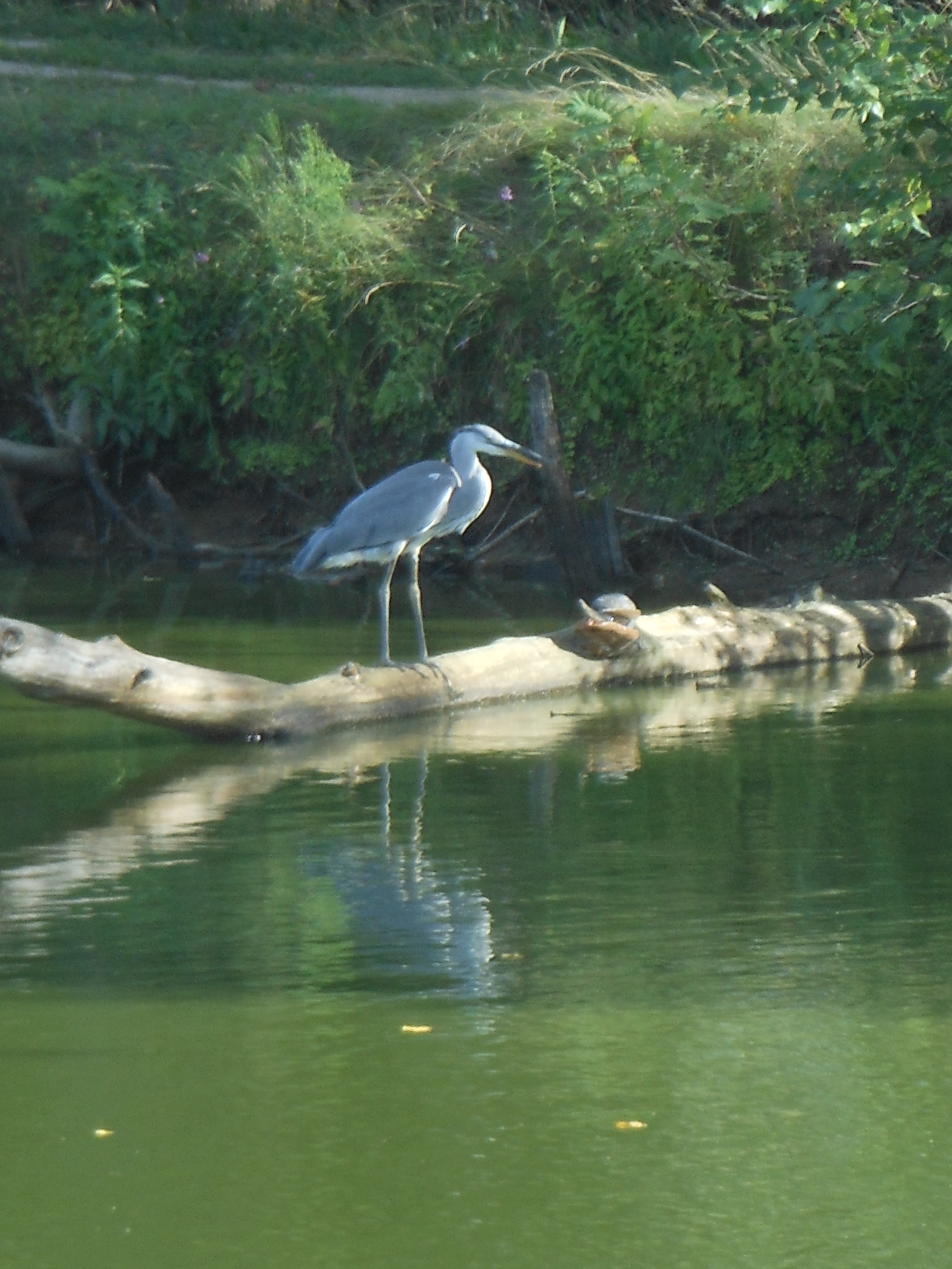 Цапля на Цивиле (район дер. Байгеево)